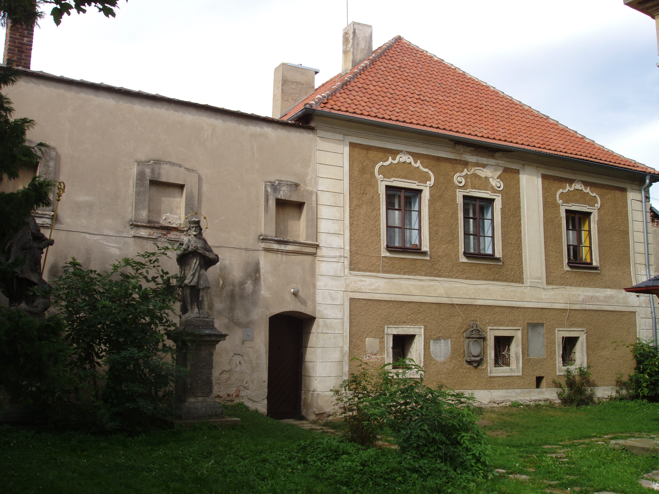 Fara (Bykáň), Bykáň 8